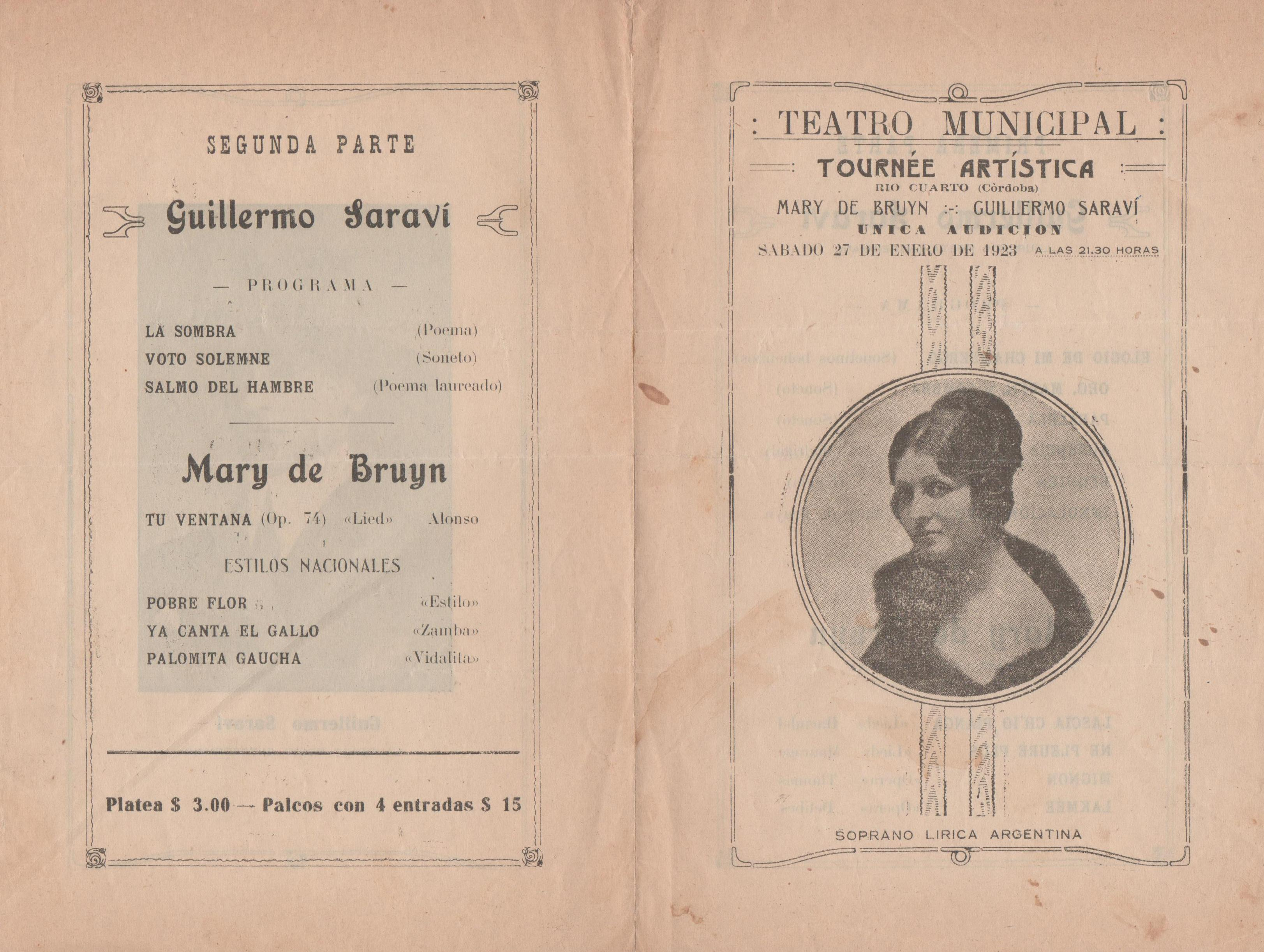 Captura de programa de Recital poético